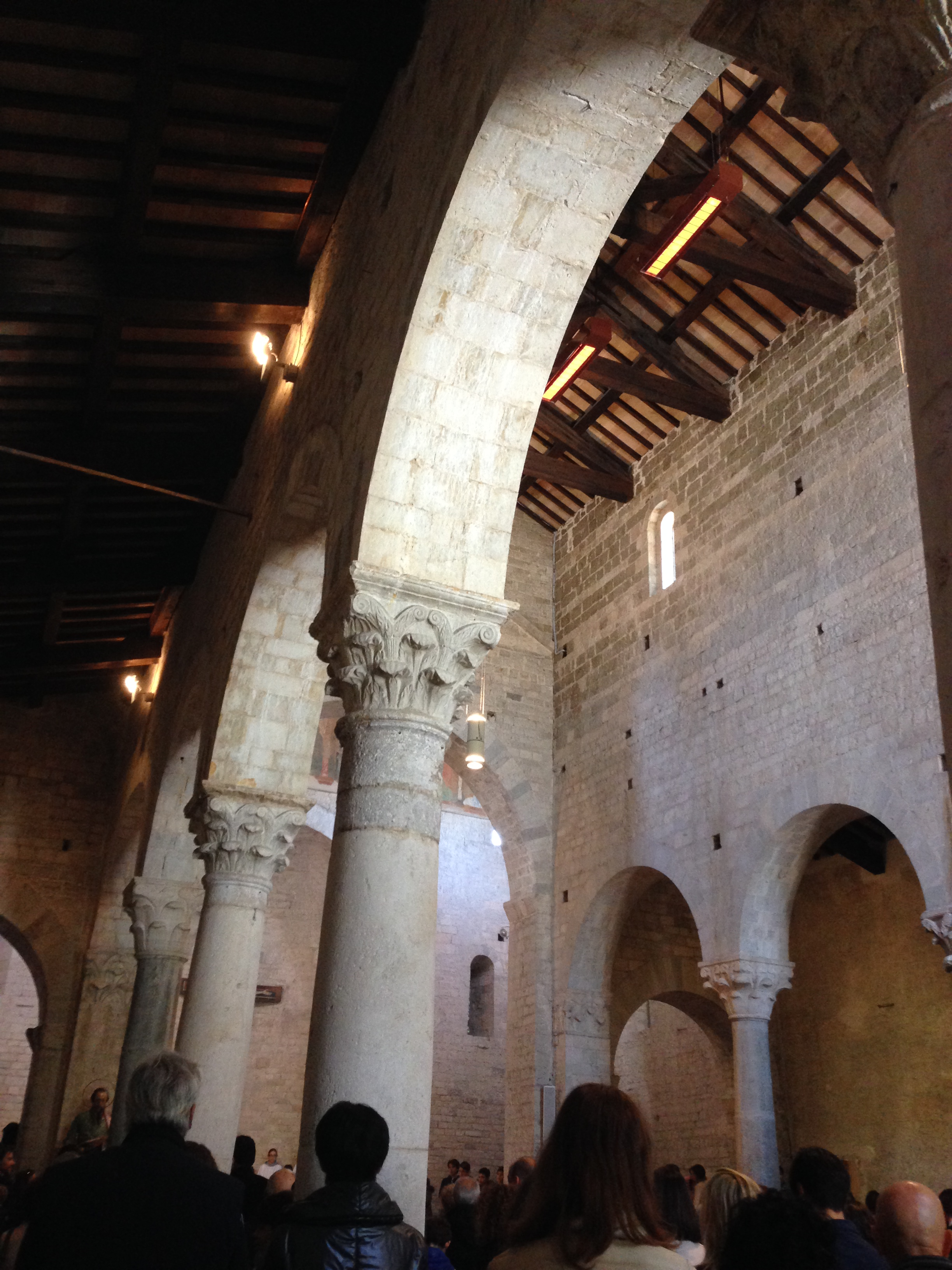 Chiesa di Sn Paolo. Spoleto. Facciata